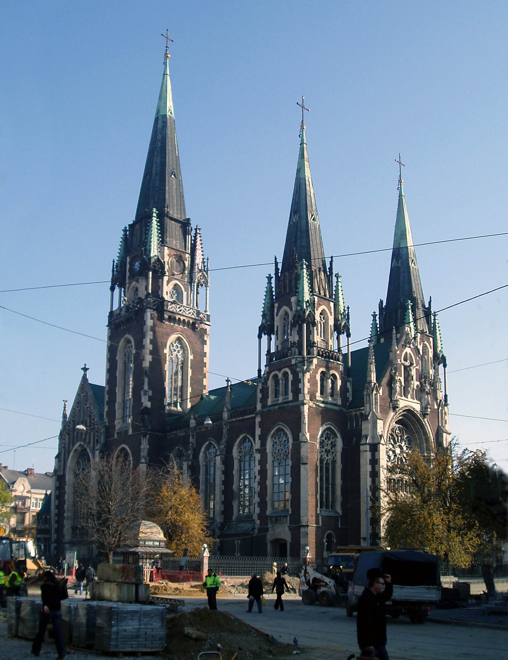 Церква святих Ольги та Єлизавети у Львові.